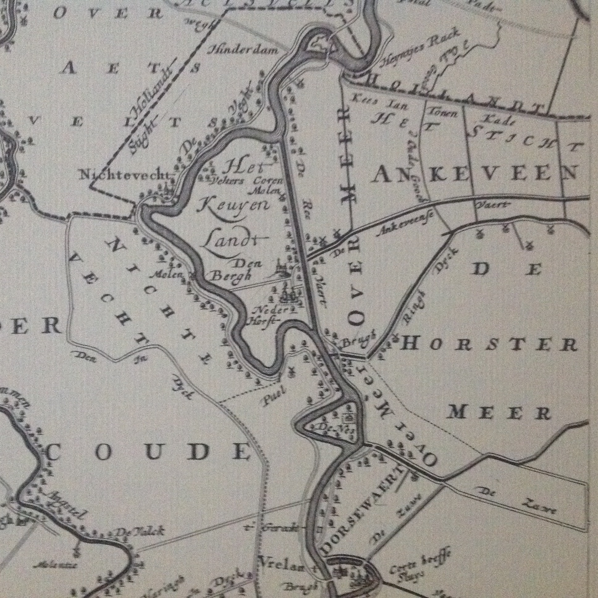 part of map of Nieuwe Kaart van de Lande van Utrecht (de Roy)